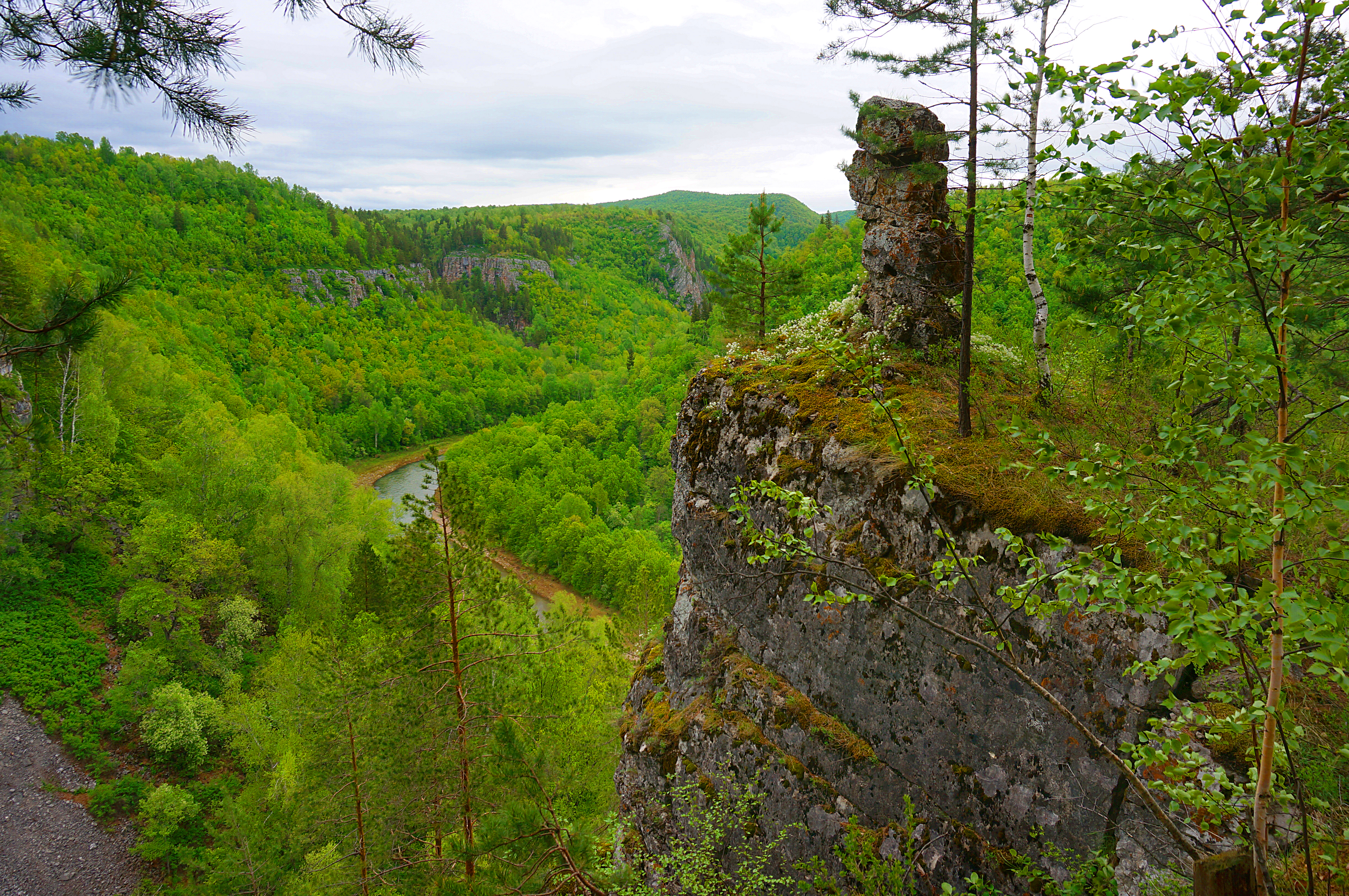 Башкирия: Национальный парк расположен на юго-западных склонах Южного Урала, к западу от водораздельного хребта Уралтау, в юго-восточной части Башкирии,Бурзянский район, Башкортостан This image is related to the protected area of Russia number 0200098